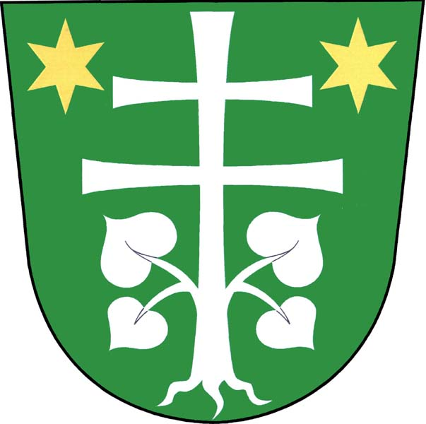 Znak obce Vysočany v okrese Blansko